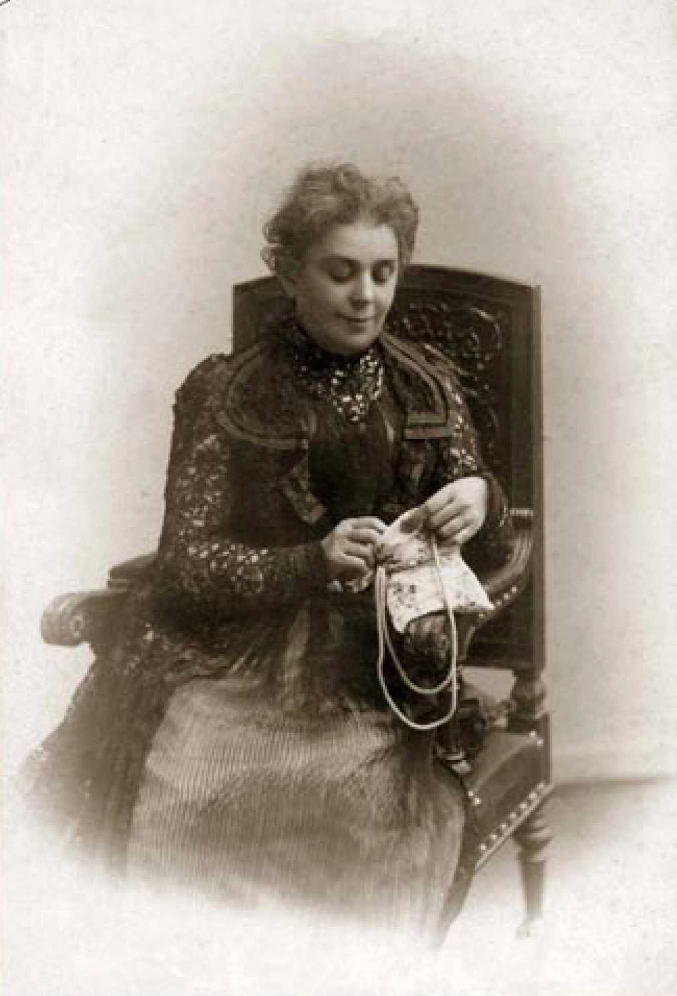 Варвара Алексеевна Морозова (урождённая Хлудова)